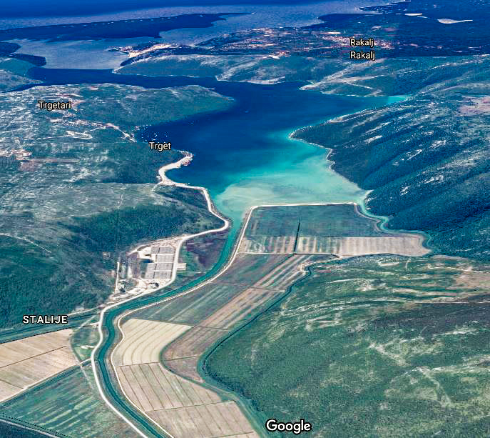 Raša firth